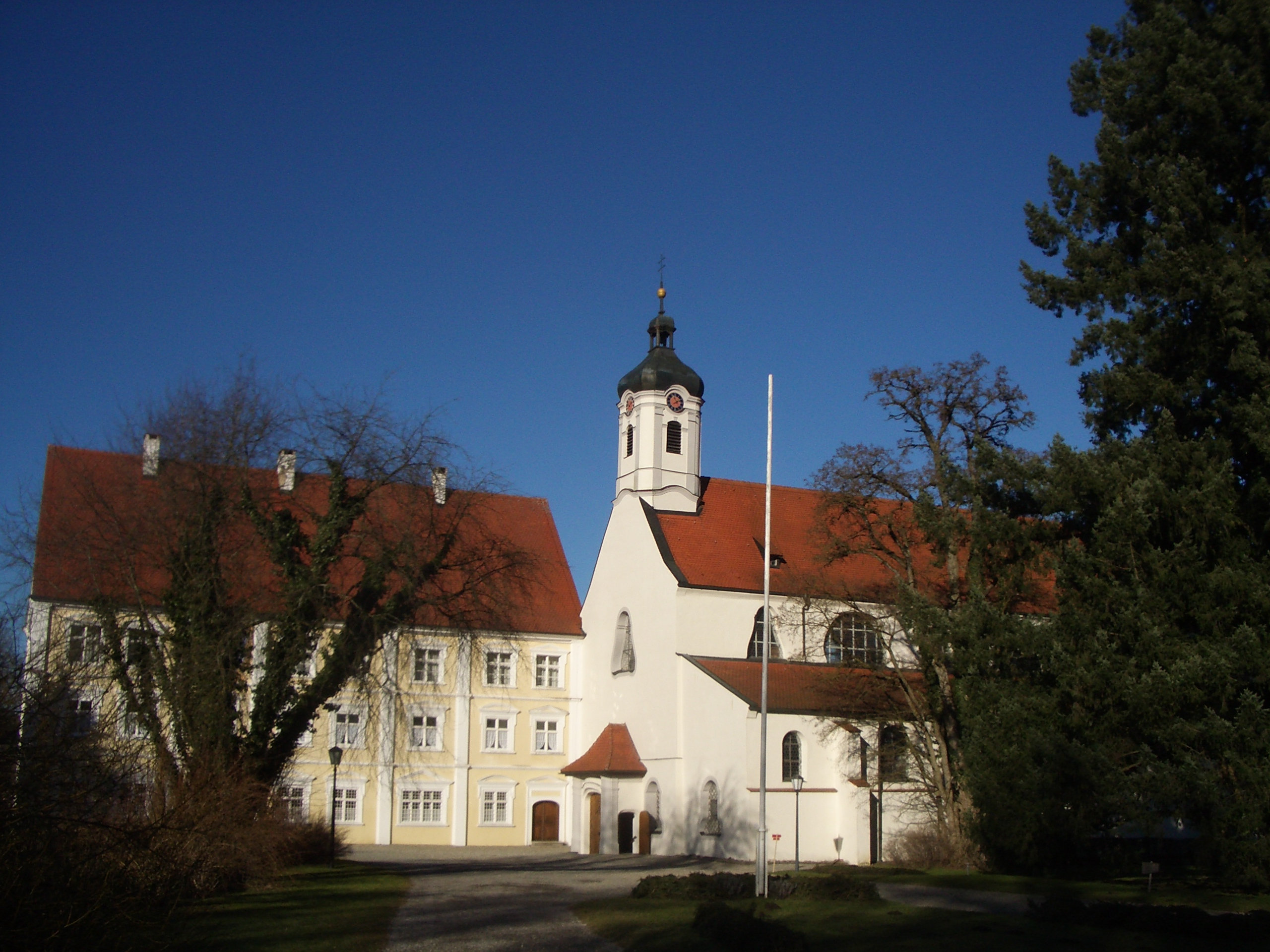 Gutenzell, Germany: Pfarrkirche St. Kosmas und Damian (ehemalige Klosterkirche)